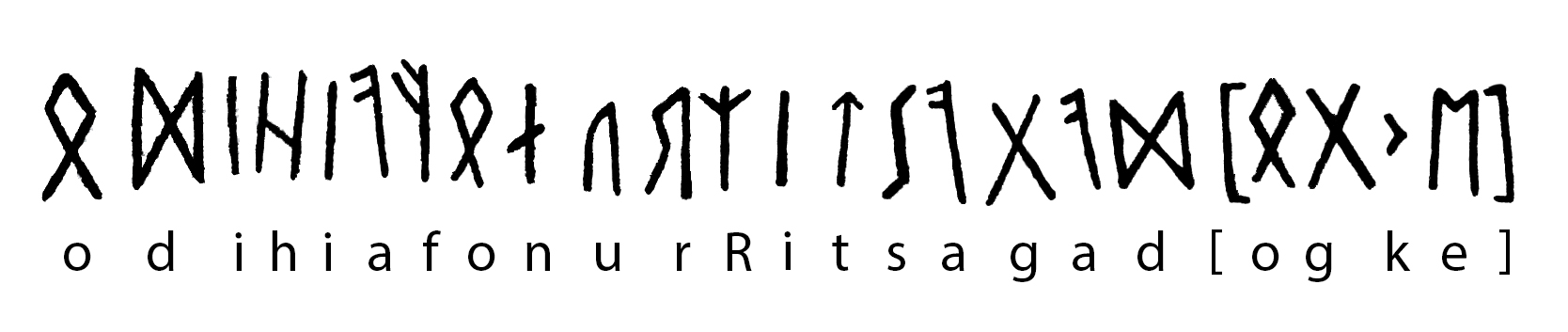 The runic inscription on the Einang Stone